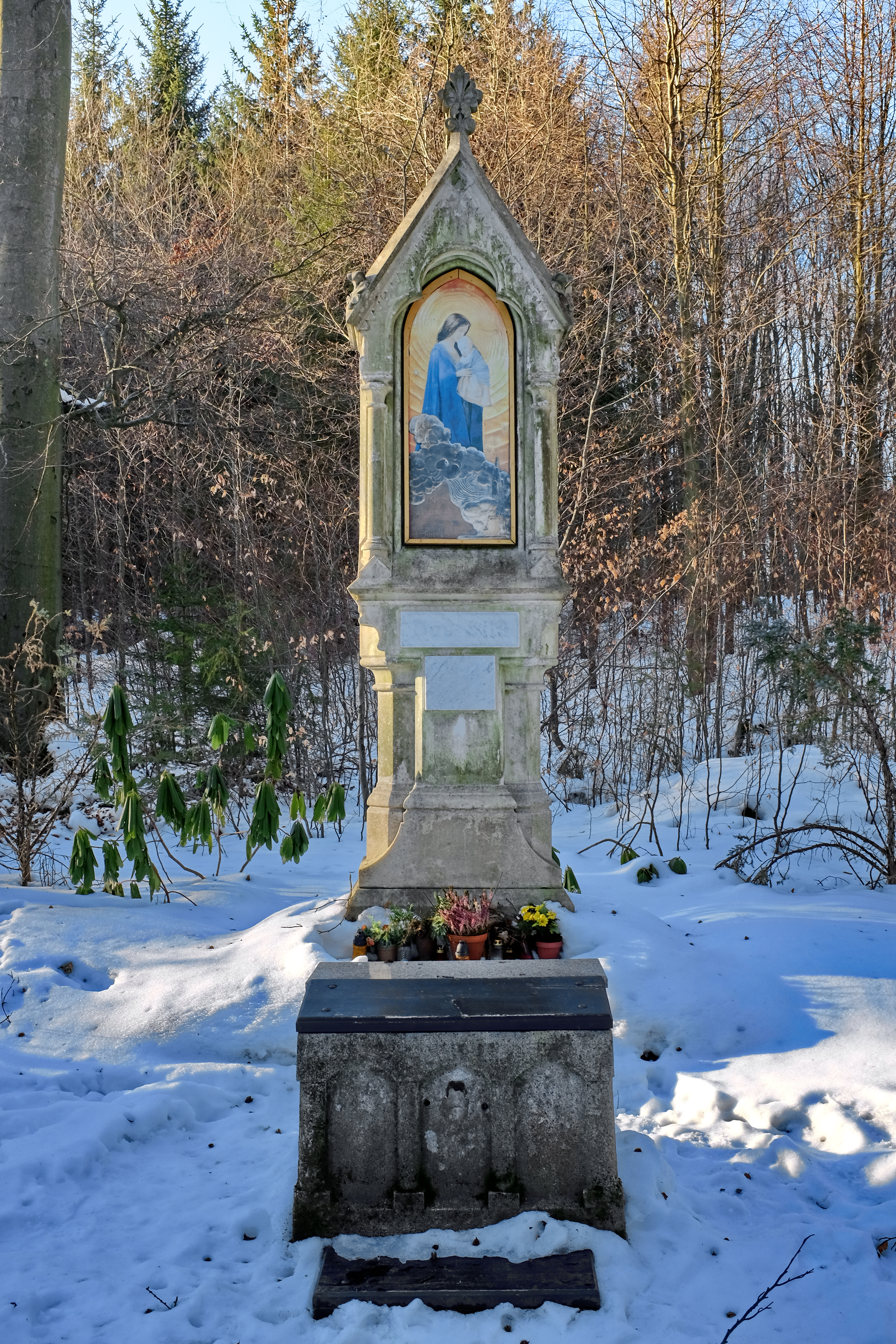 Lesní pobožnost - kaplička U obrazu, karlovarské lázeňské lesy